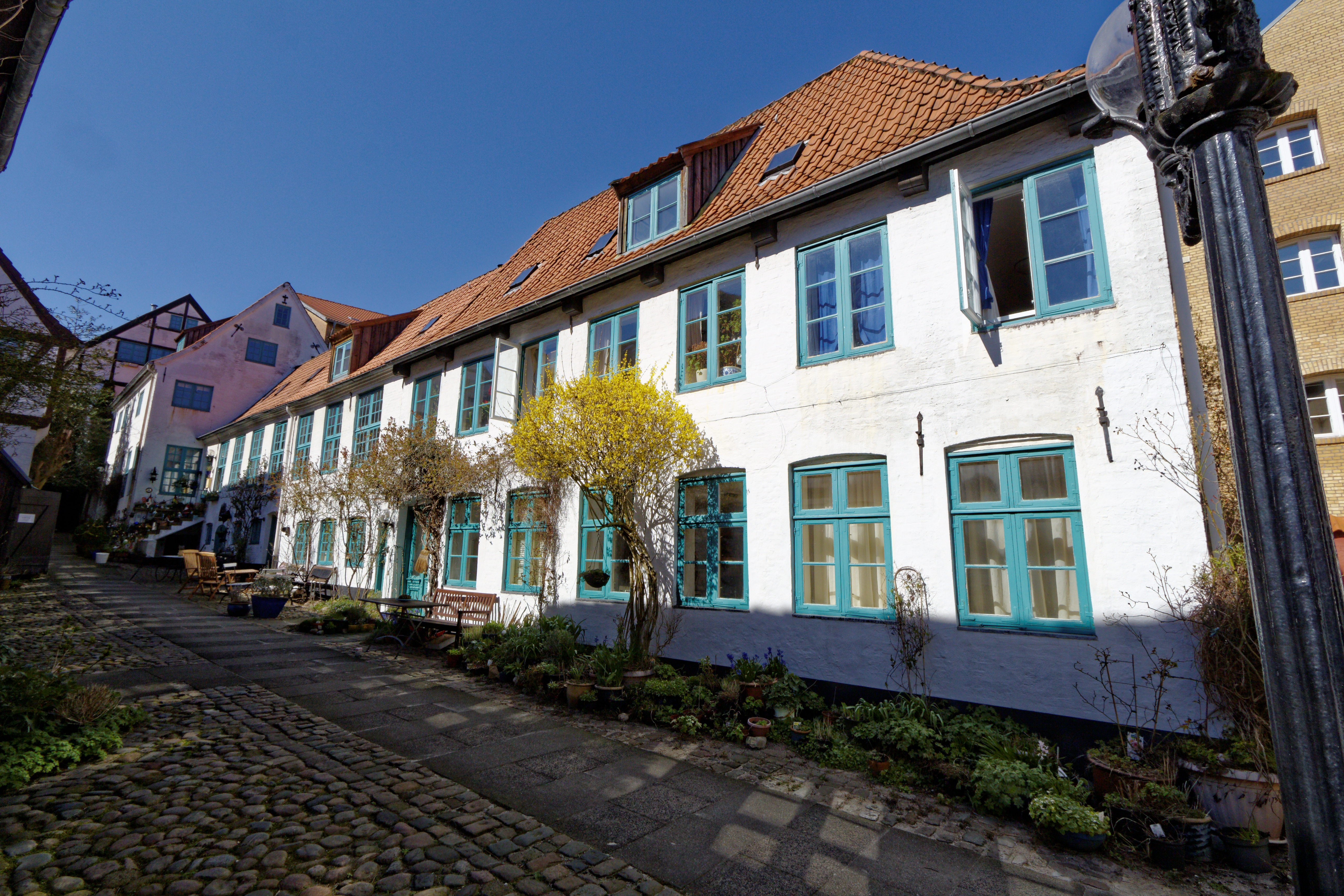 Flensburg, Norderstr. 86; nördlicher Seitenflügel 2